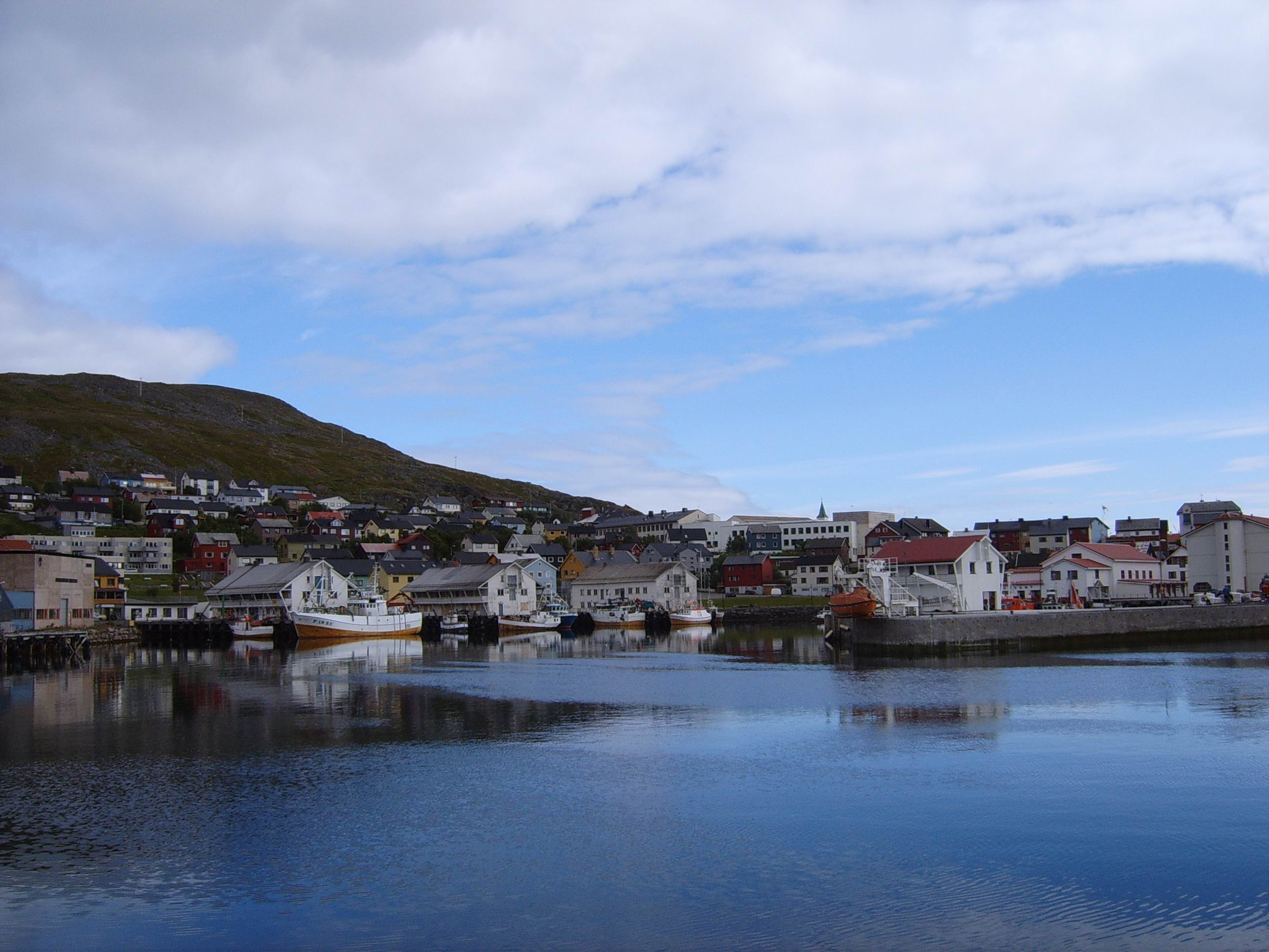 Honningsvåg, Norway.